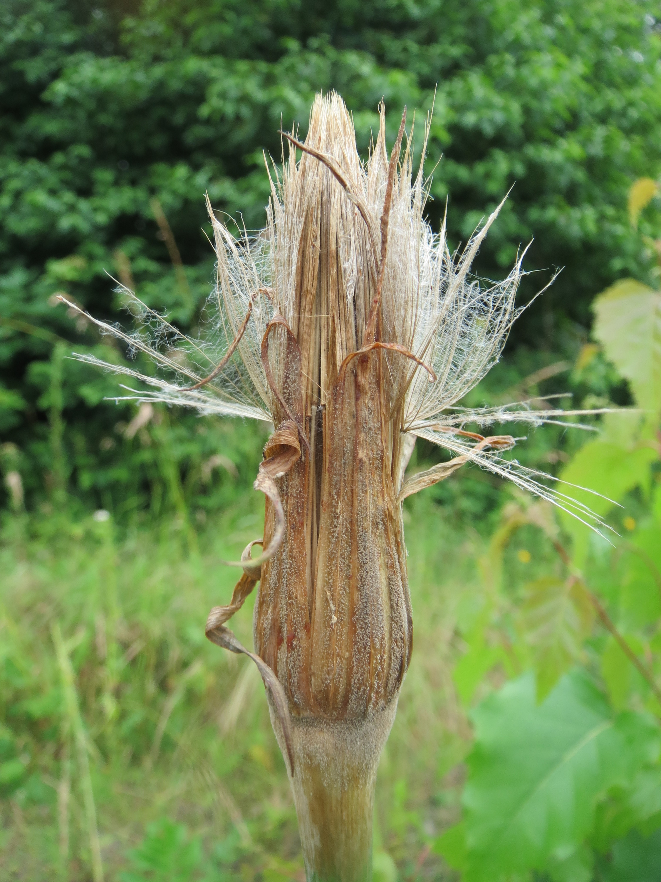 Großer Bocksbart (Tragopogon dubius) in Bruchmühlbach-Miesau